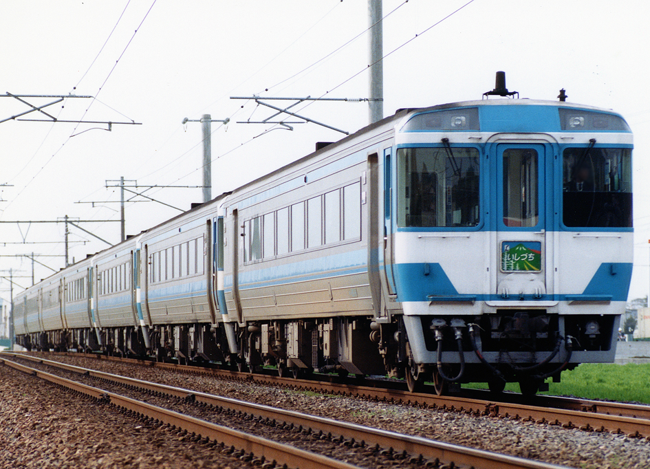 JR四国 キハ185系特急形気動車 特急「いしづち」